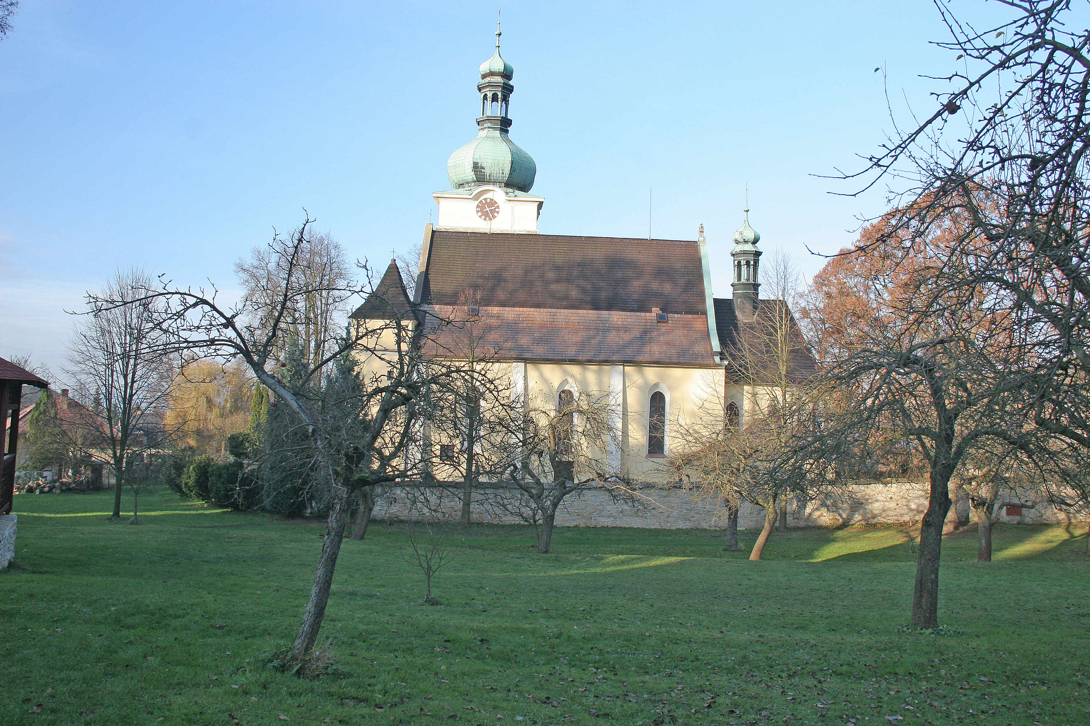 Přepychy kostel sv. Prokopa